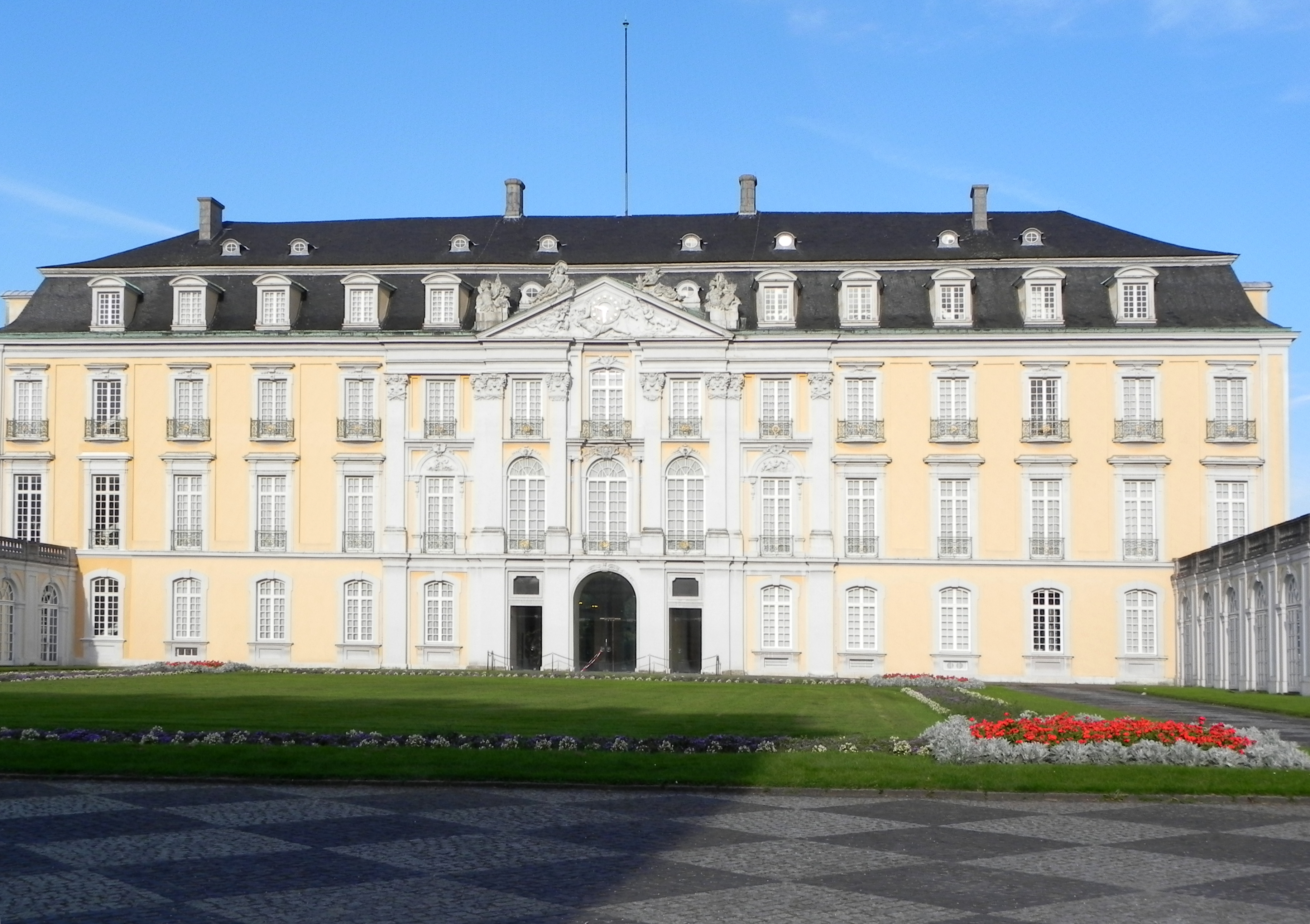 Schloss Augustusburg Stadtseite Richtung Brühl